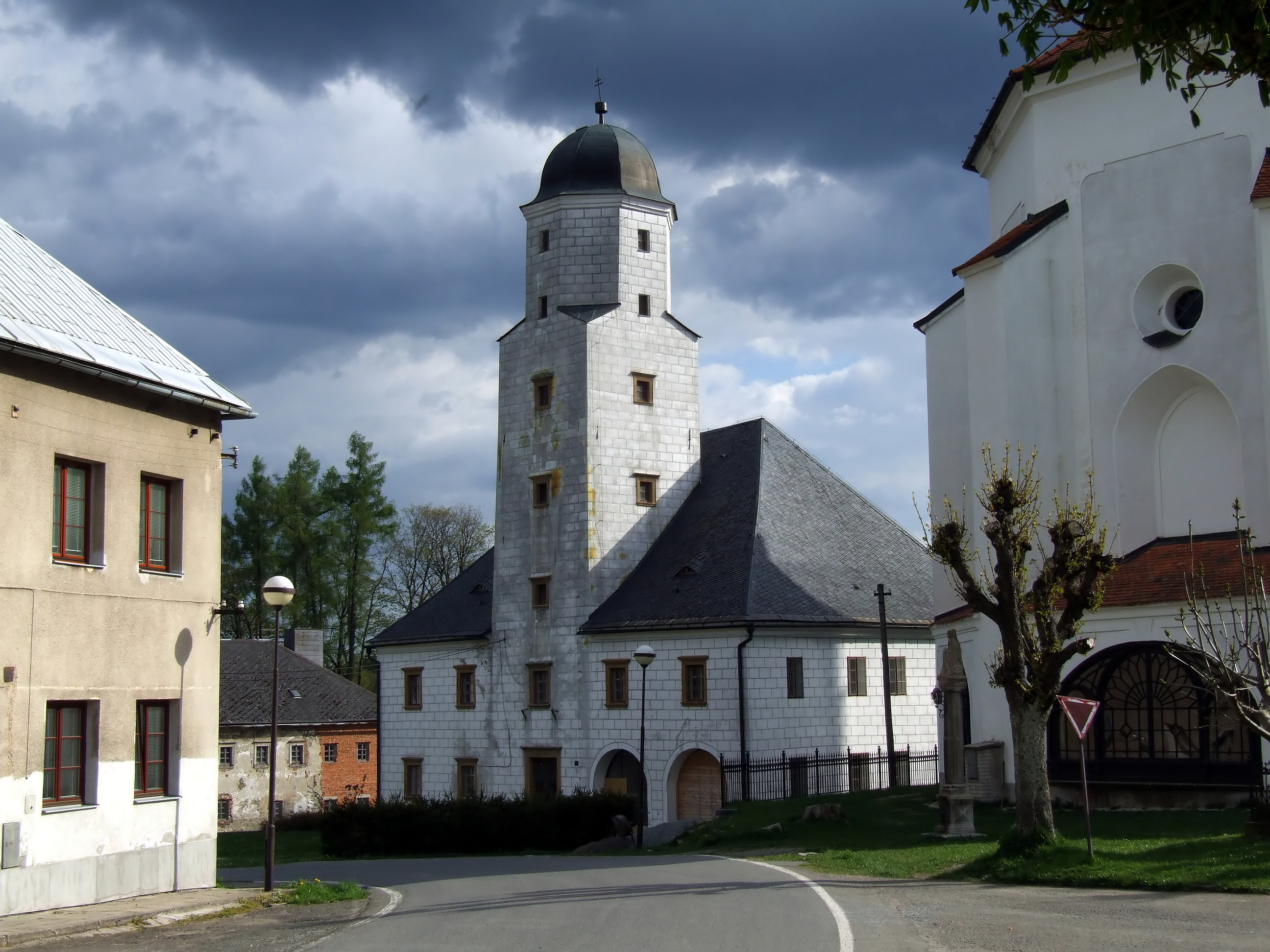 Goldenstein (Branna) - Fojtství. Budynek wójtostwa